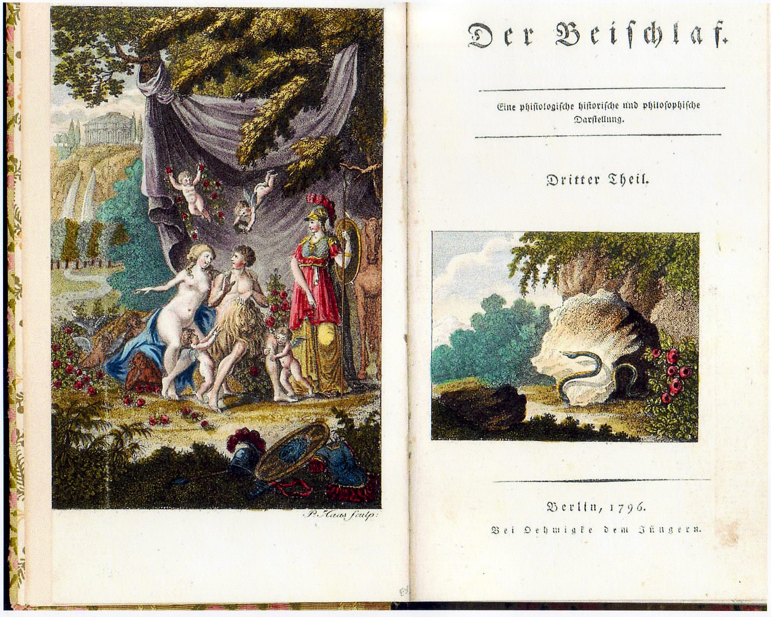 "Der Beischlaf. Eine phisiologische, historische und philosophische Darstellung." Titelseite mit Kupferstichen.